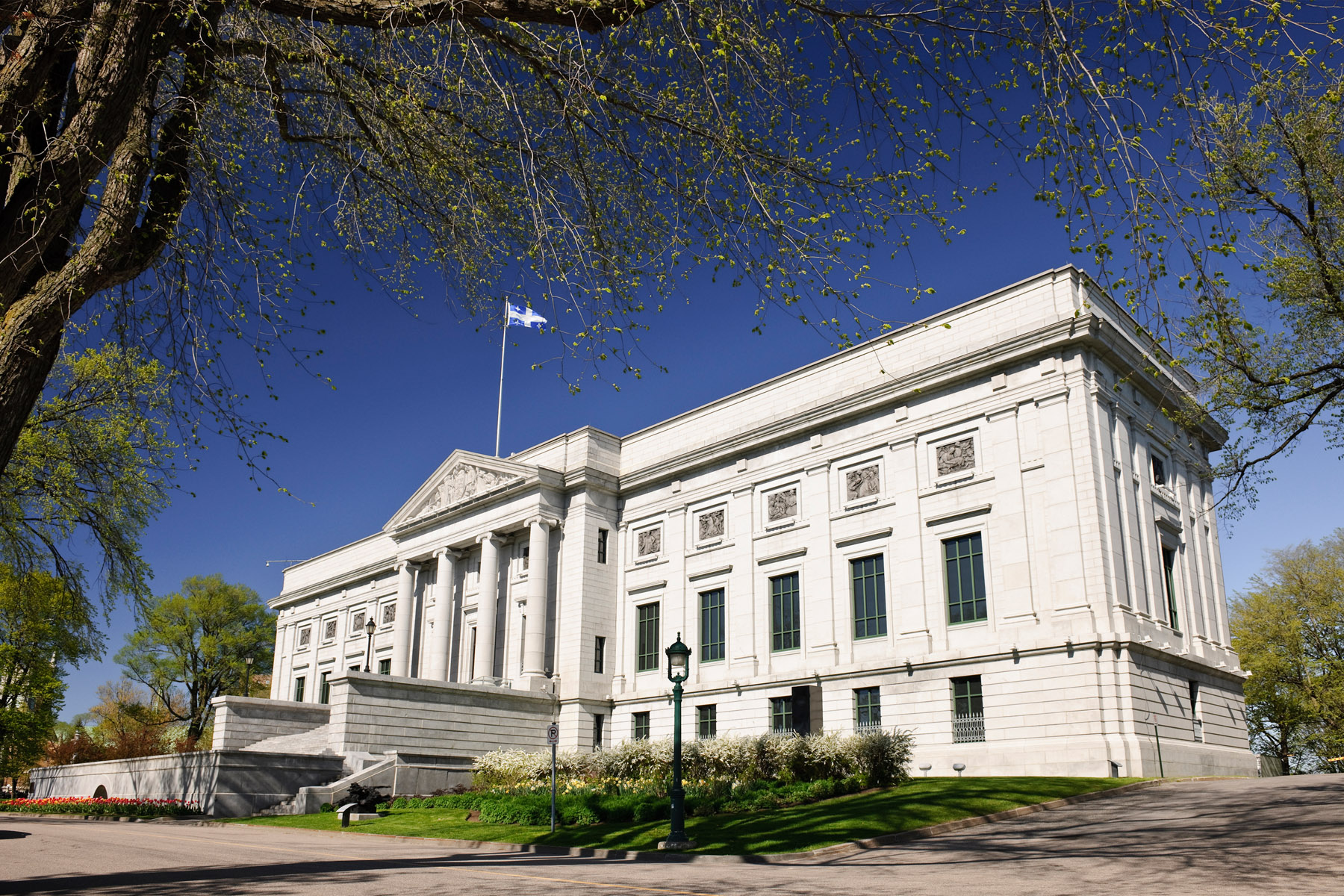 Le pavillon Gérard-Morisset, du Musée national des beaux-arts du Québec